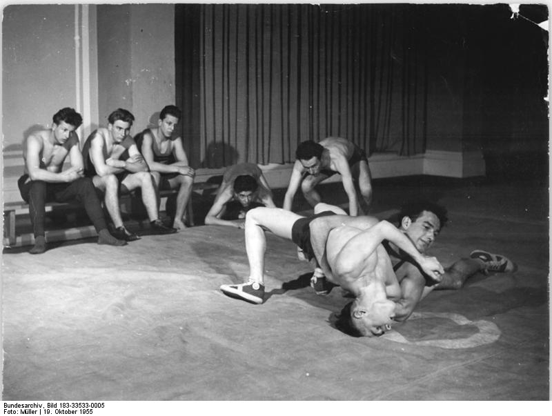 Leipzig, DHfK, Ringen Zentralbild Müller-Bey-Ho. 19.10.1955 5 Jahre Deutsche Hochschule für Körperkultur. UBz: Studenten während einer Unterrichtsstunde im Ringen. (Siehe unseren Begleittext: "5 Jahre Deutsche Hochschule für Körperkultur").